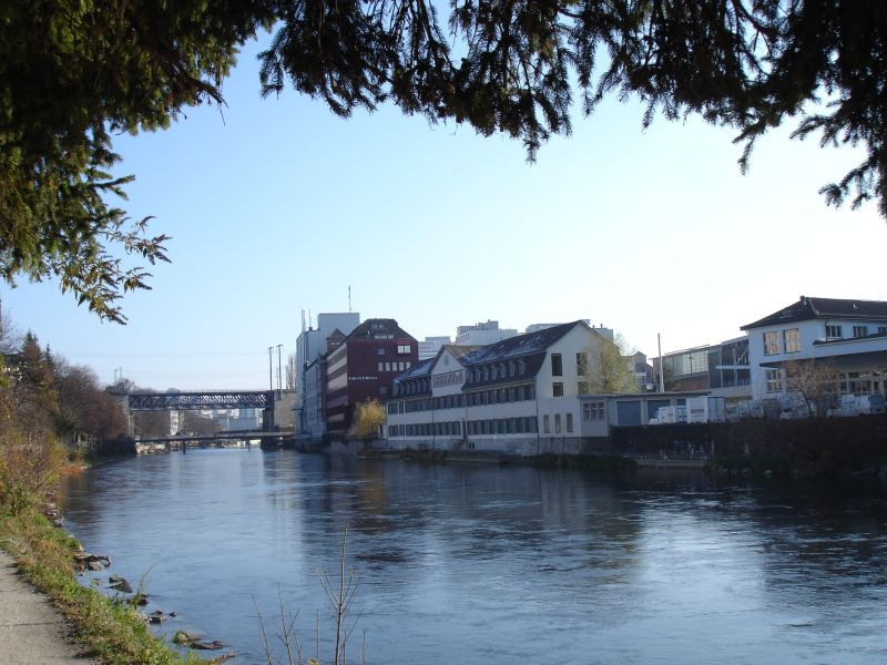 SwissMill